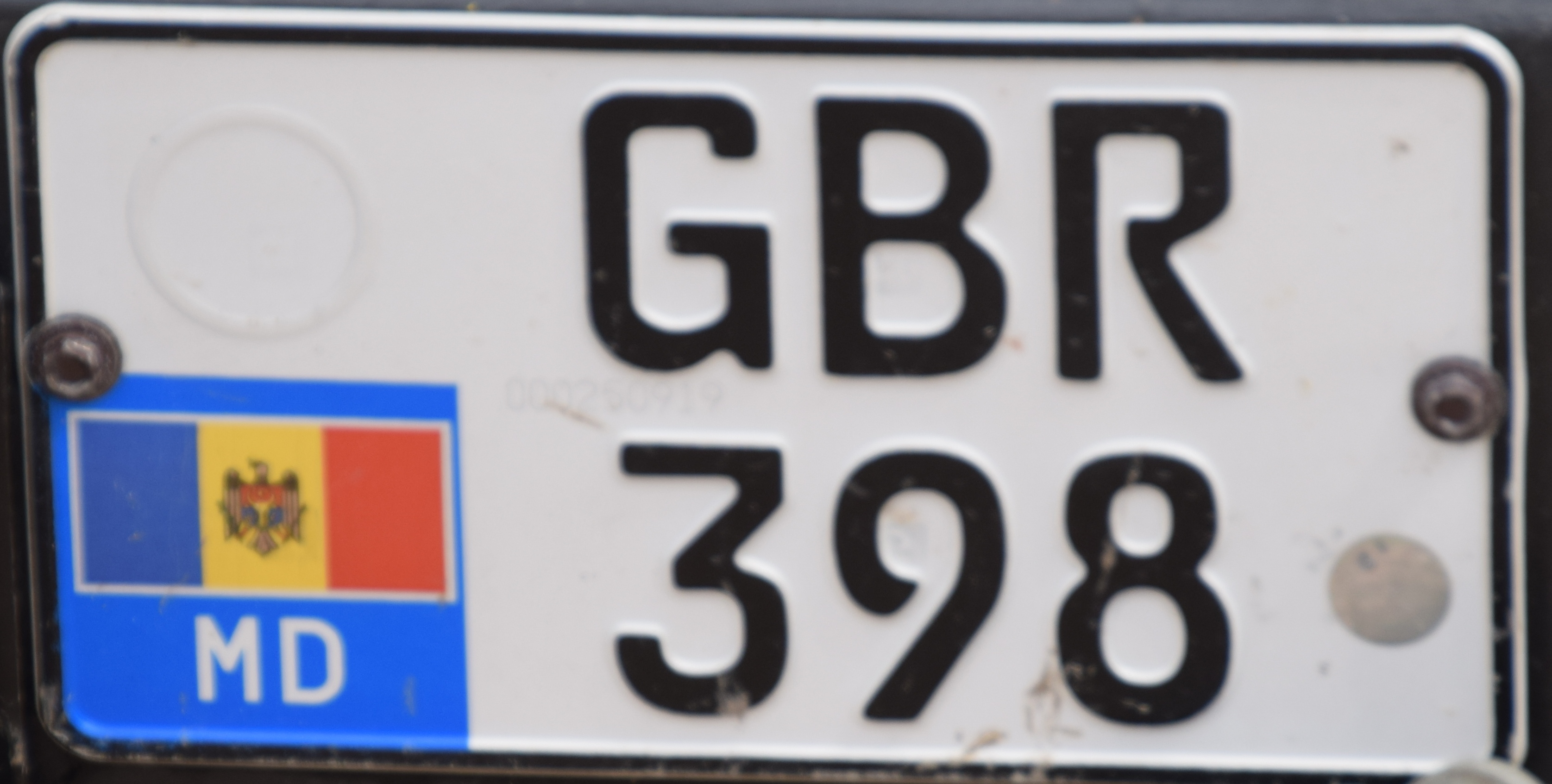 Kentekenplaat Moldavië